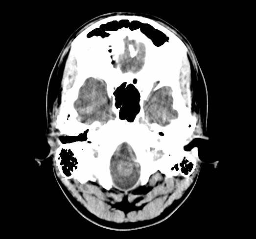 Tac cranica